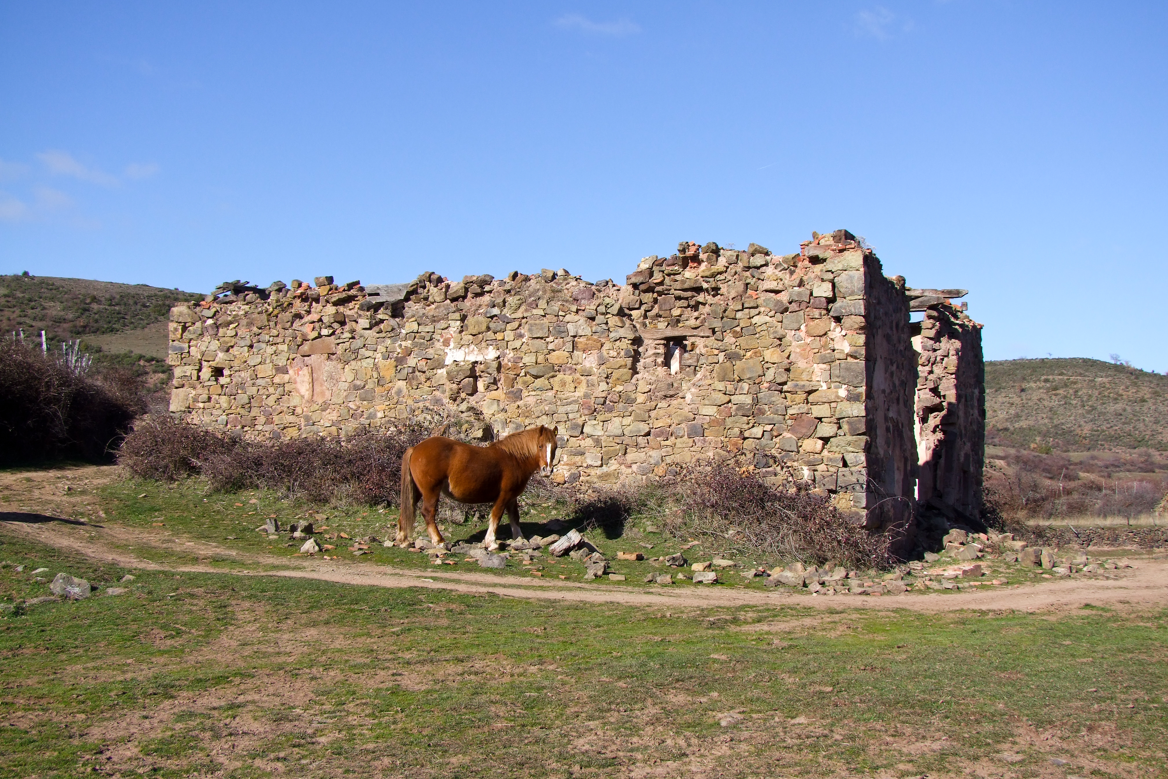 Restos de la ermita de San Antón en Laguna de Cameros, La Rioja - España